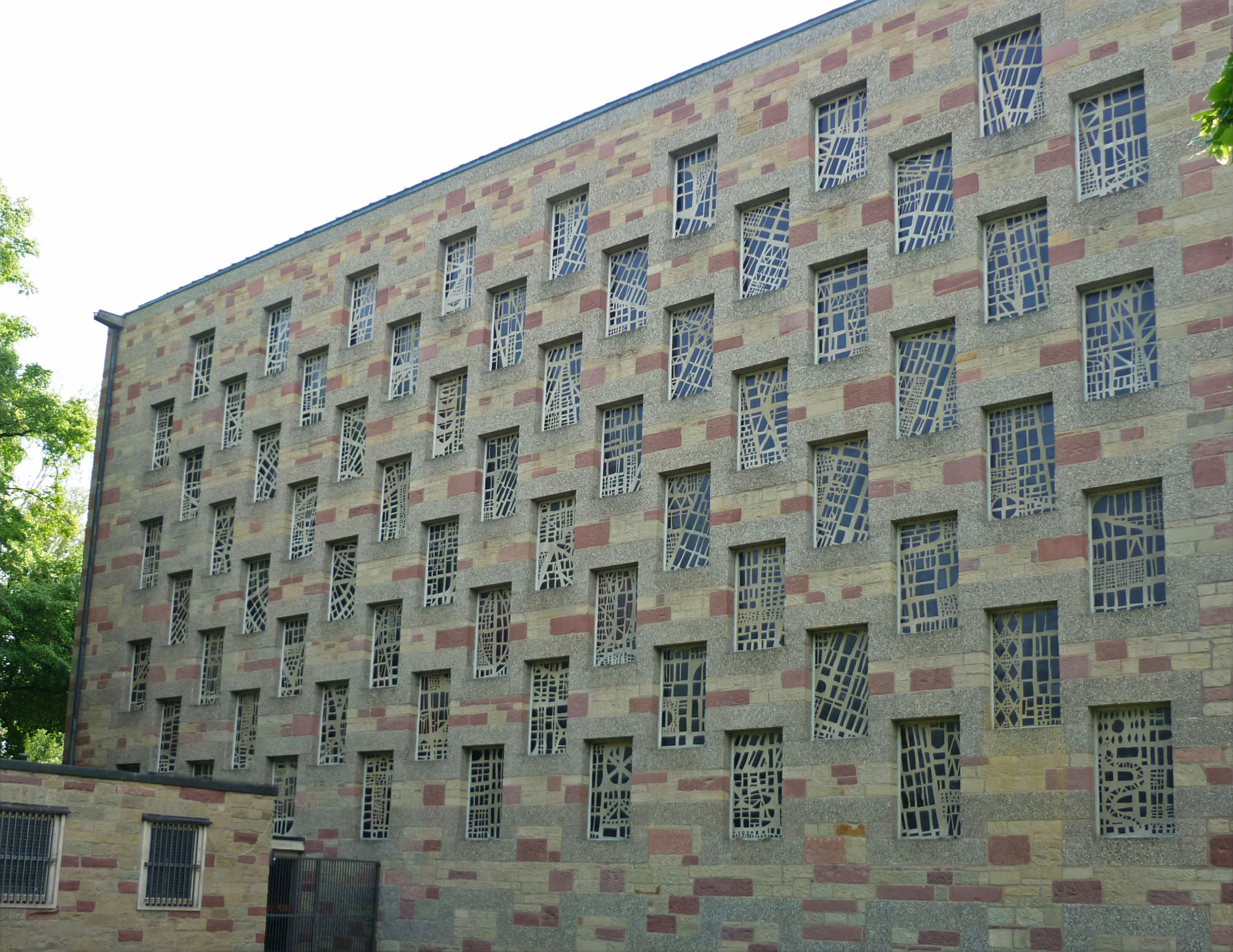 Evang. Stadtkirche in Pforzheim (Württemberg)